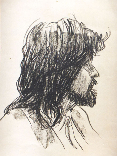 home iconostas by Volodymyr Lukan